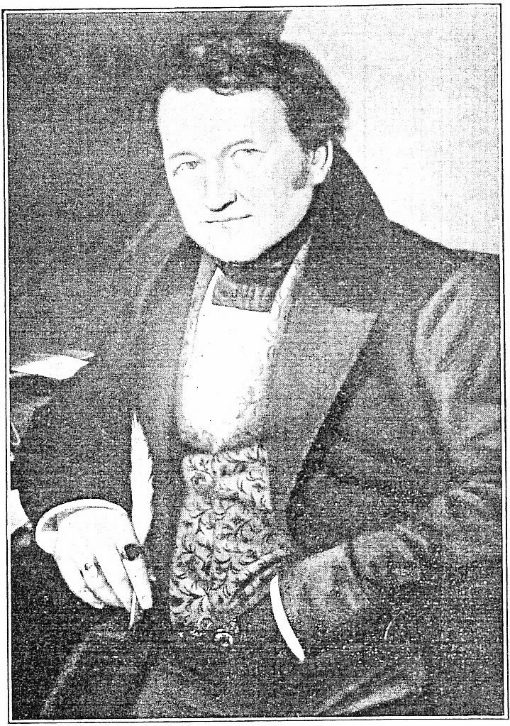 Porträt des Papierfabrikanten Carl Friedrich August Fischer (1778-1842)